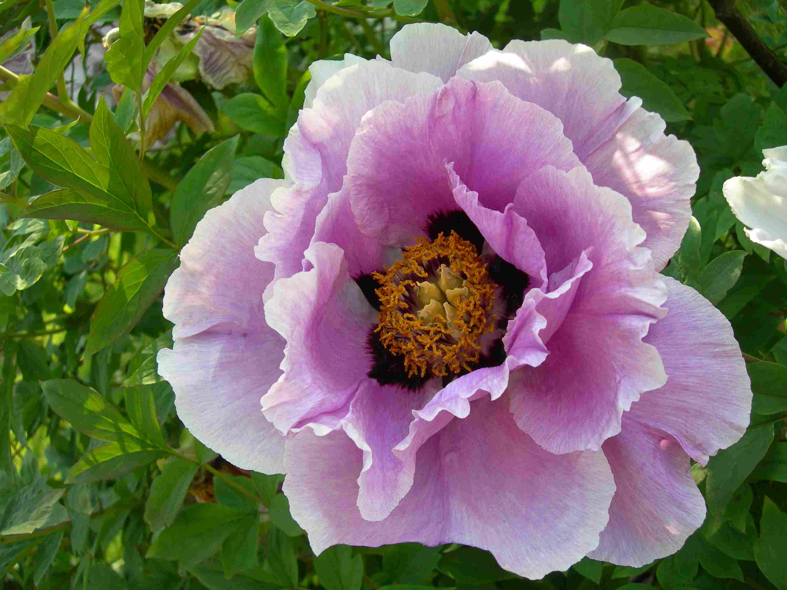 Kr?minio bij?no ?iedas. Foto:Ieva Gau?ait? Krūminio bijūno (Paeonia suffruticosa) žiedas